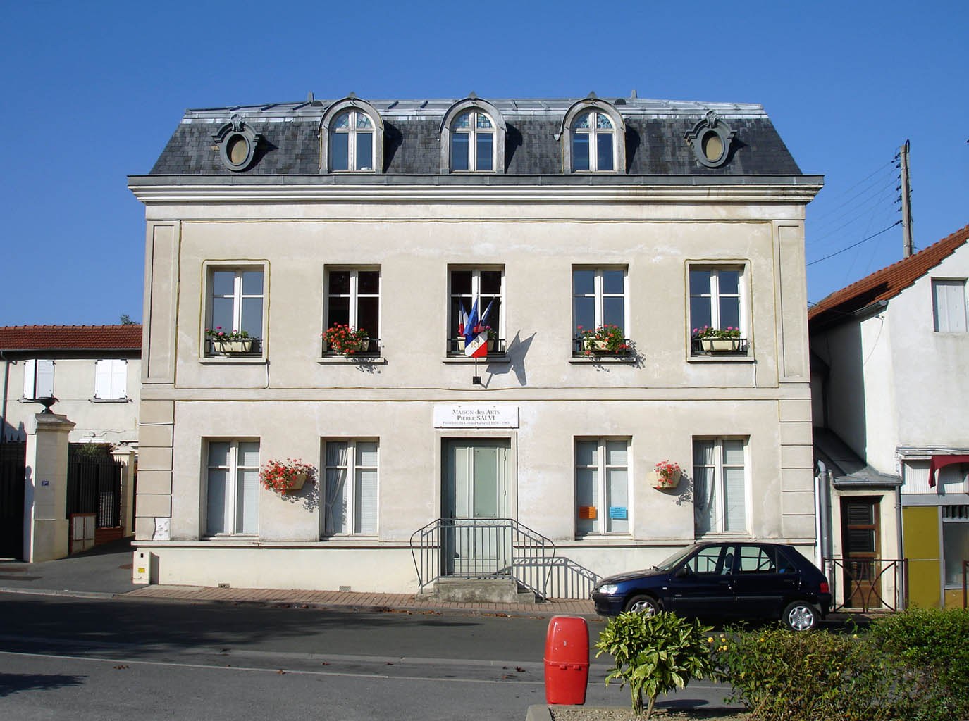 La maison des Arts Pierre-Salvi à Montlignon (Val-d'Oise), France